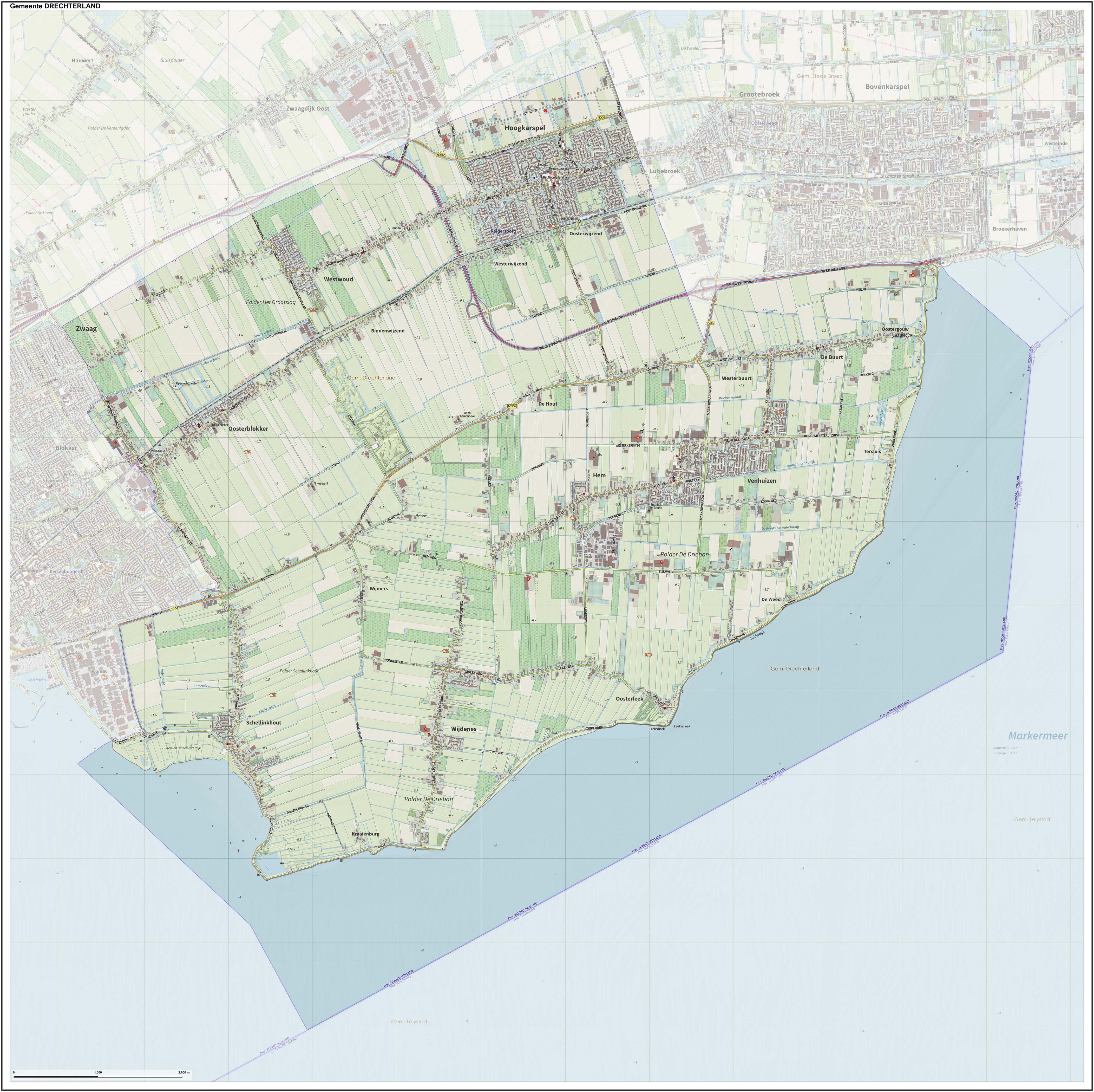 Topografische gemeentekaart. Resolutie: 400 pixels/km. Kaartbeeld samengesteld uit de open geodata van de Top10NL en Top25namen (Kadaster), Creative Commons-BY licentie. Gebouwvlakken uit open geodata BAG extract. Wegen uit de OpenStreetMap, OpenStreetMap community. Reliëfschaduw uit de Actuele Hoogtekaart AHN2. Samenstelling en kleurenschema: Jan-Willem van Aalst, met QGIS. Zie ook de Legenda.